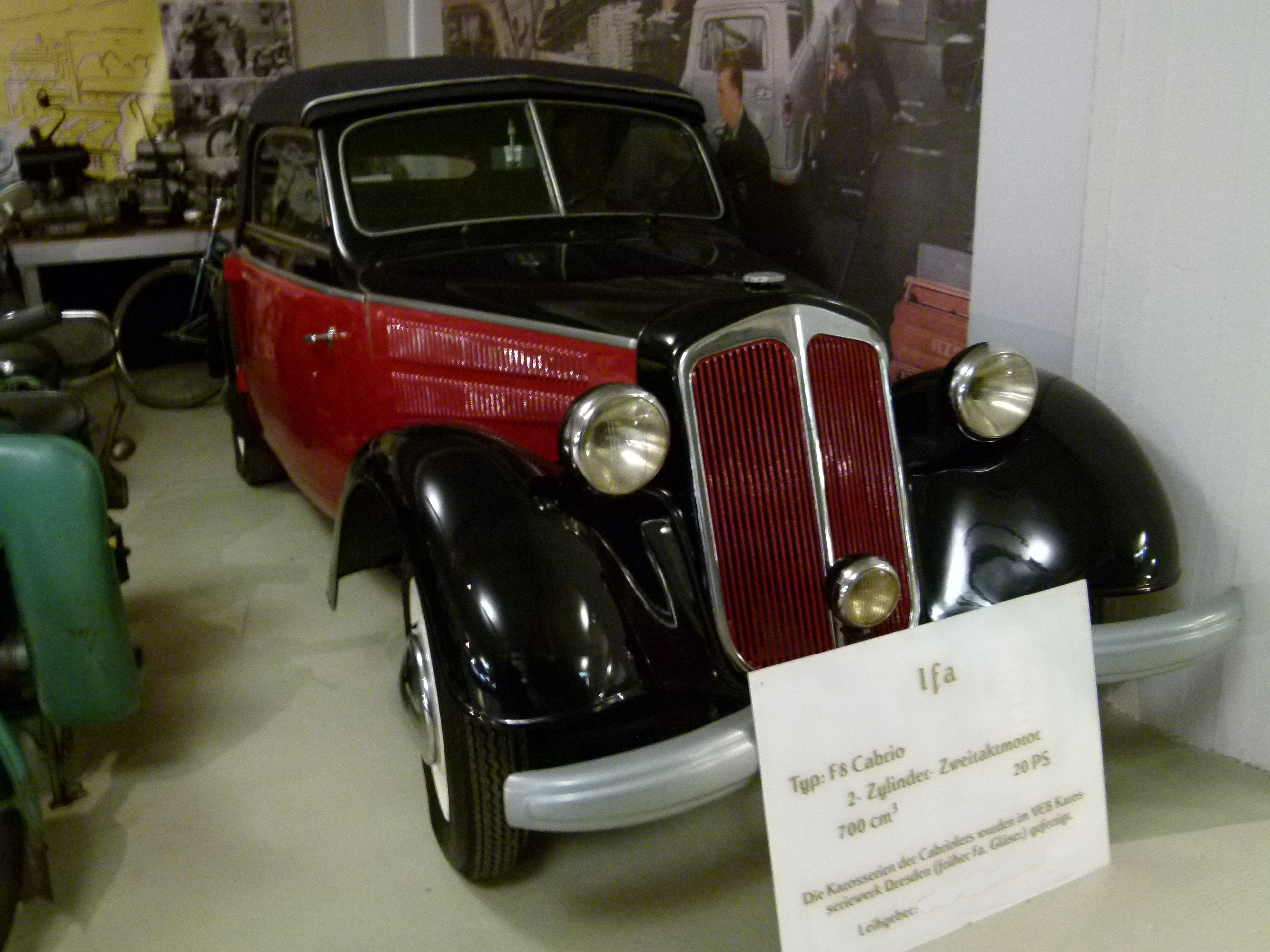 IFA F8 Cabrio, Fahrzeugmuseum Chemnitz